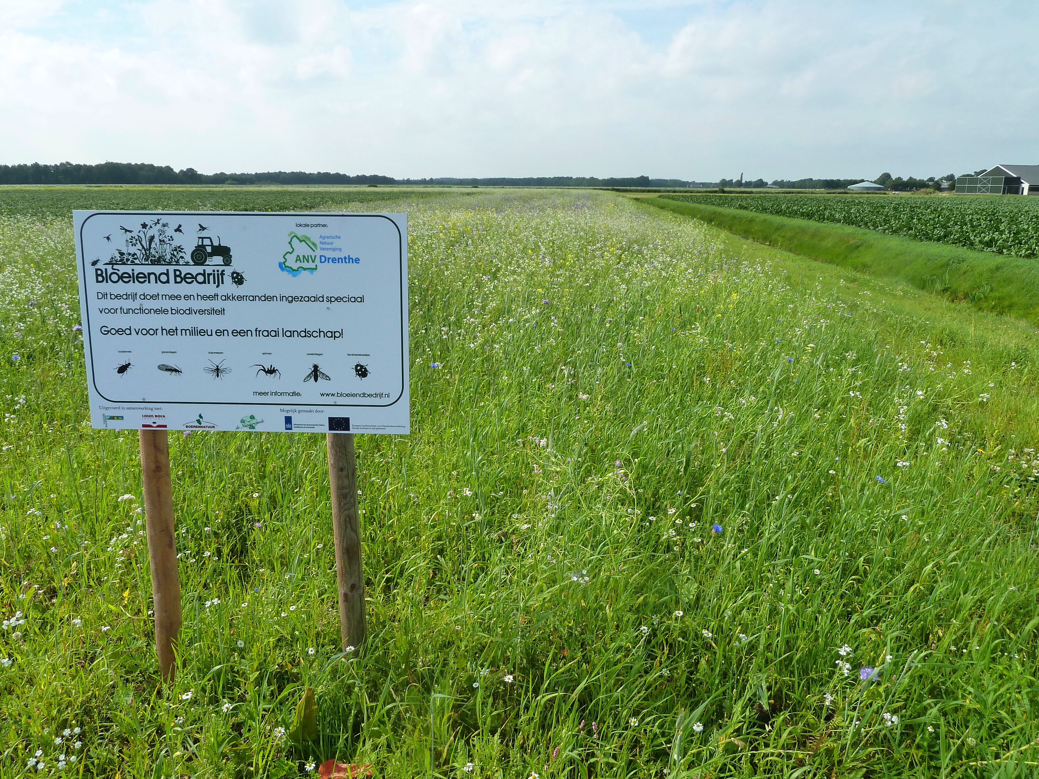 Faunarand langs een akker in Drenthe nabij Assen